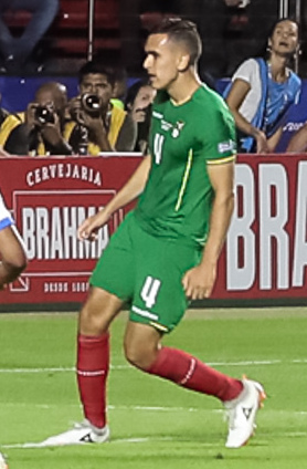 (São Paulo - SP, 14/06/2019) Segundo gol da seleção Brasileira de Futebol. Foto: Marcos Corrêa/PR